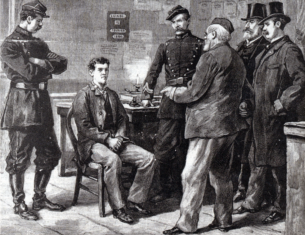 Imagem de jornal do interrogatório de Émile Henry